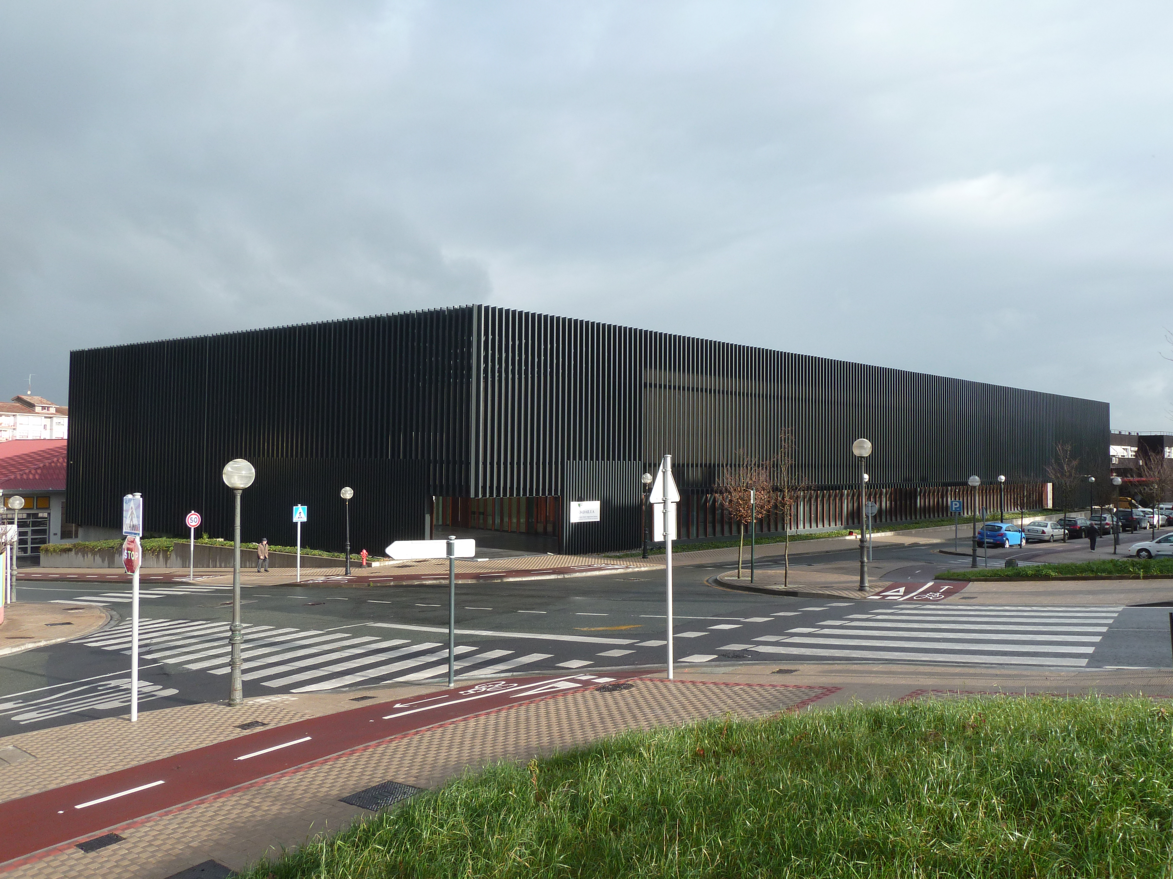 Gordailua kanpoko ikuspegi orokorra mendebal eta hego aurrealdeak